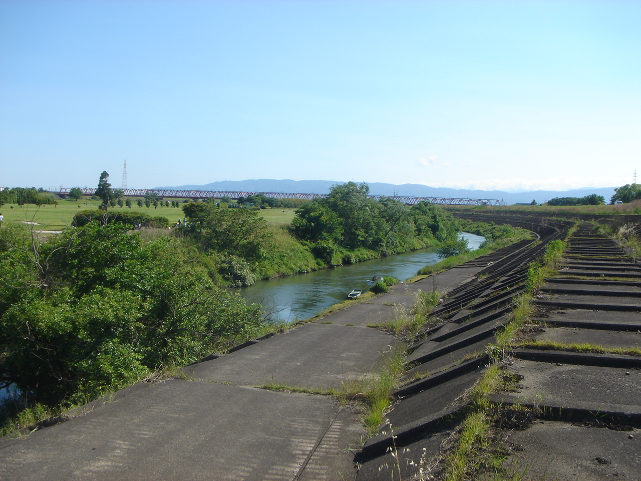 ShinSaikawa(新犀川(犀川 (岐阜県)の下流)),Anpachi,Gifu,Japan(岐阜県安八町)で撮影